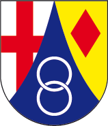 Wappen der Ortsgemeinde Boos (Eifel)